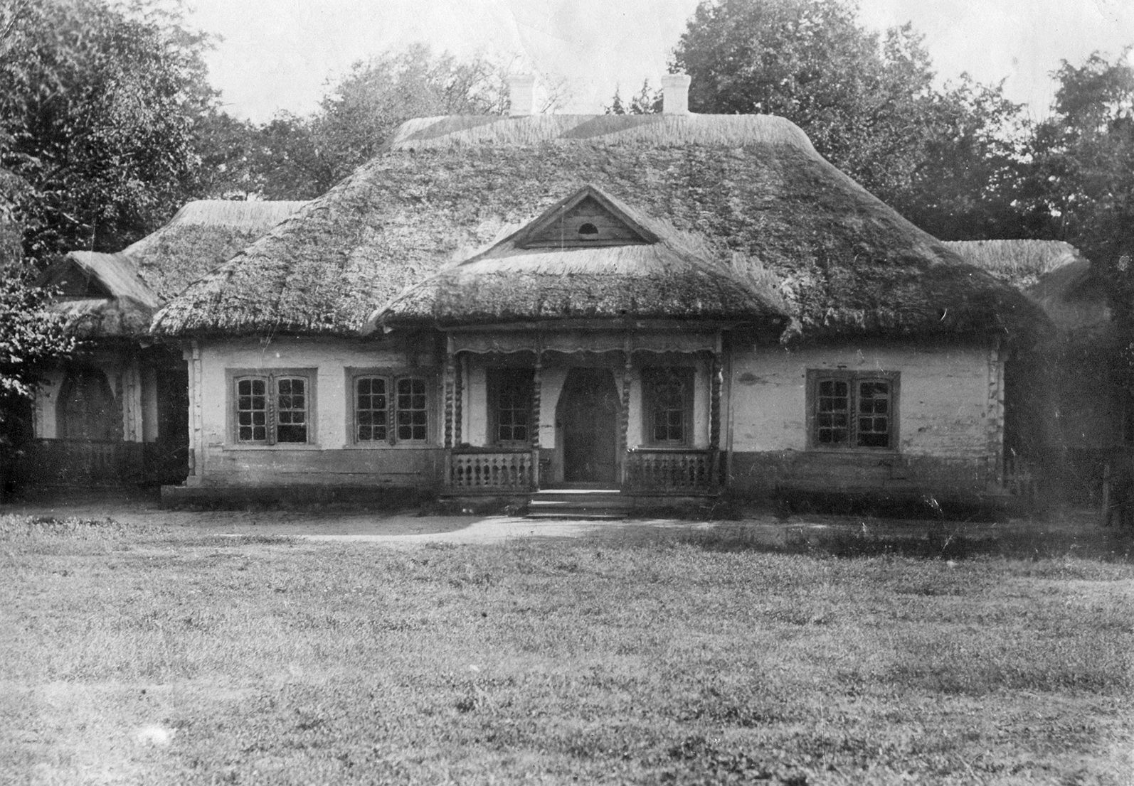 Будинок для гостей у садибі Г.П.Галагана. Головний фасад будинку. Фото початку ХХ ст.